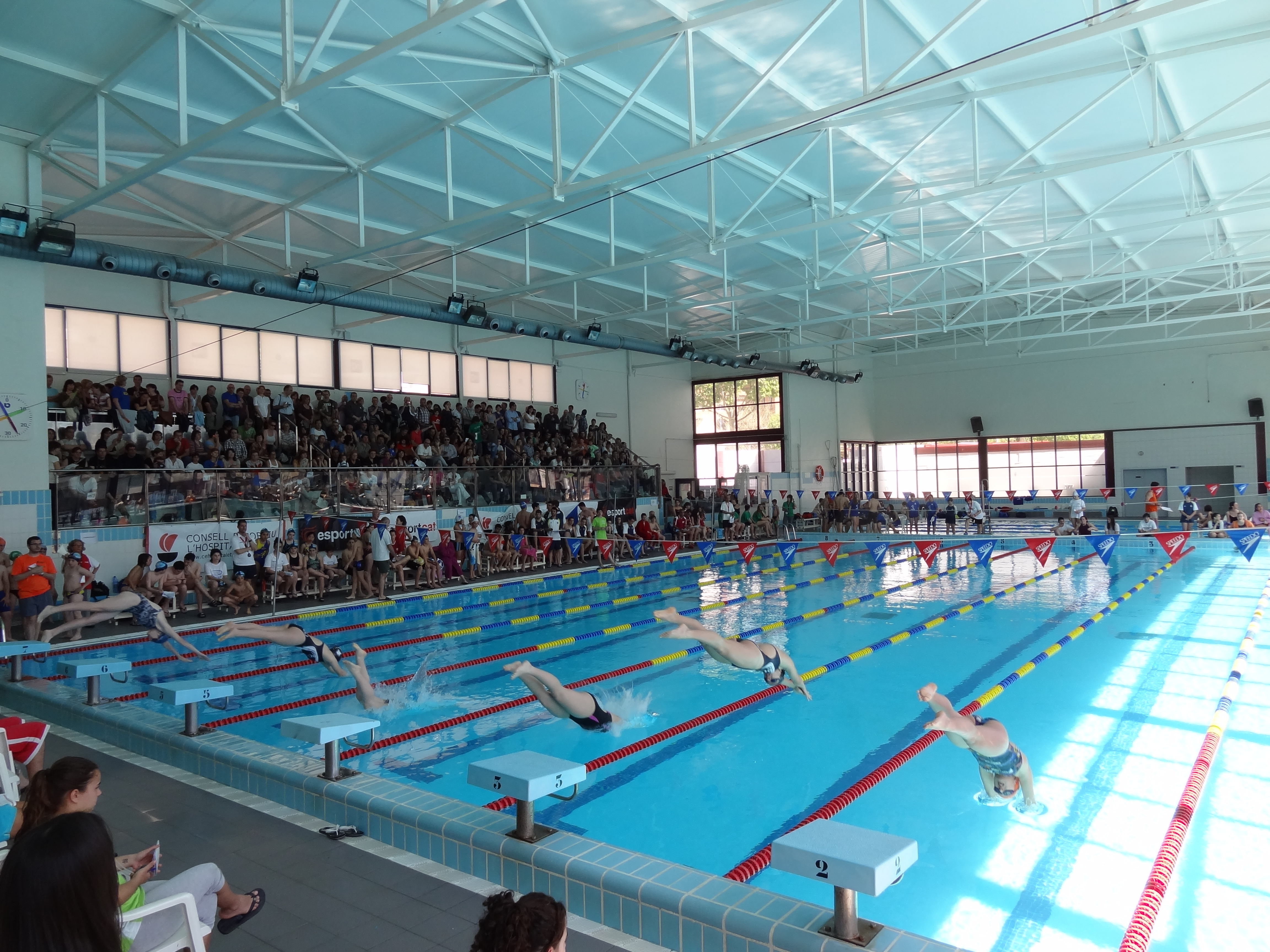 Natación